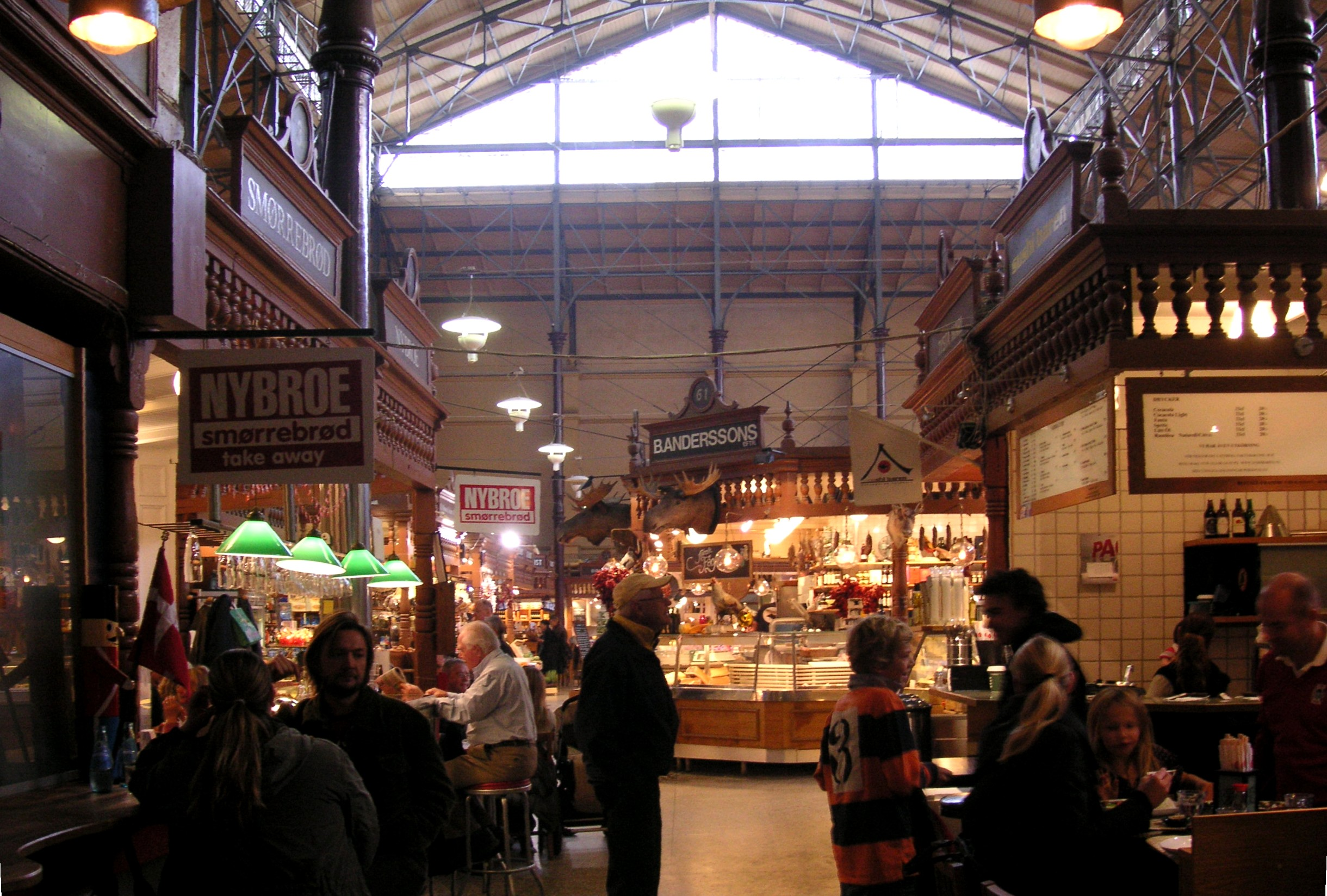 Östermalms Saluhall i Stockholm 2007